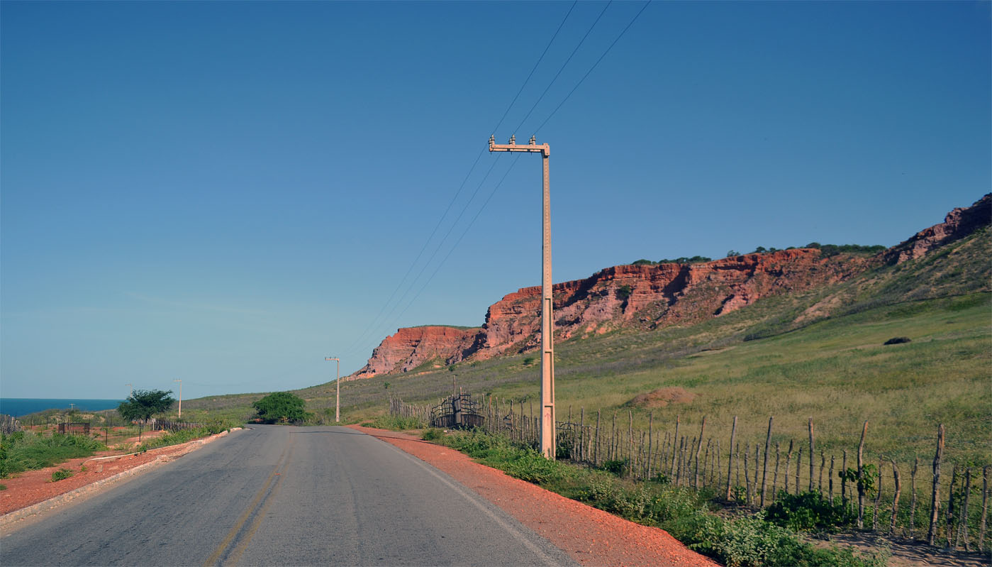 Estrada de acesso a praia de Ponta do Mel, uma das mais visitadas da cidade de Areia Branca-RN